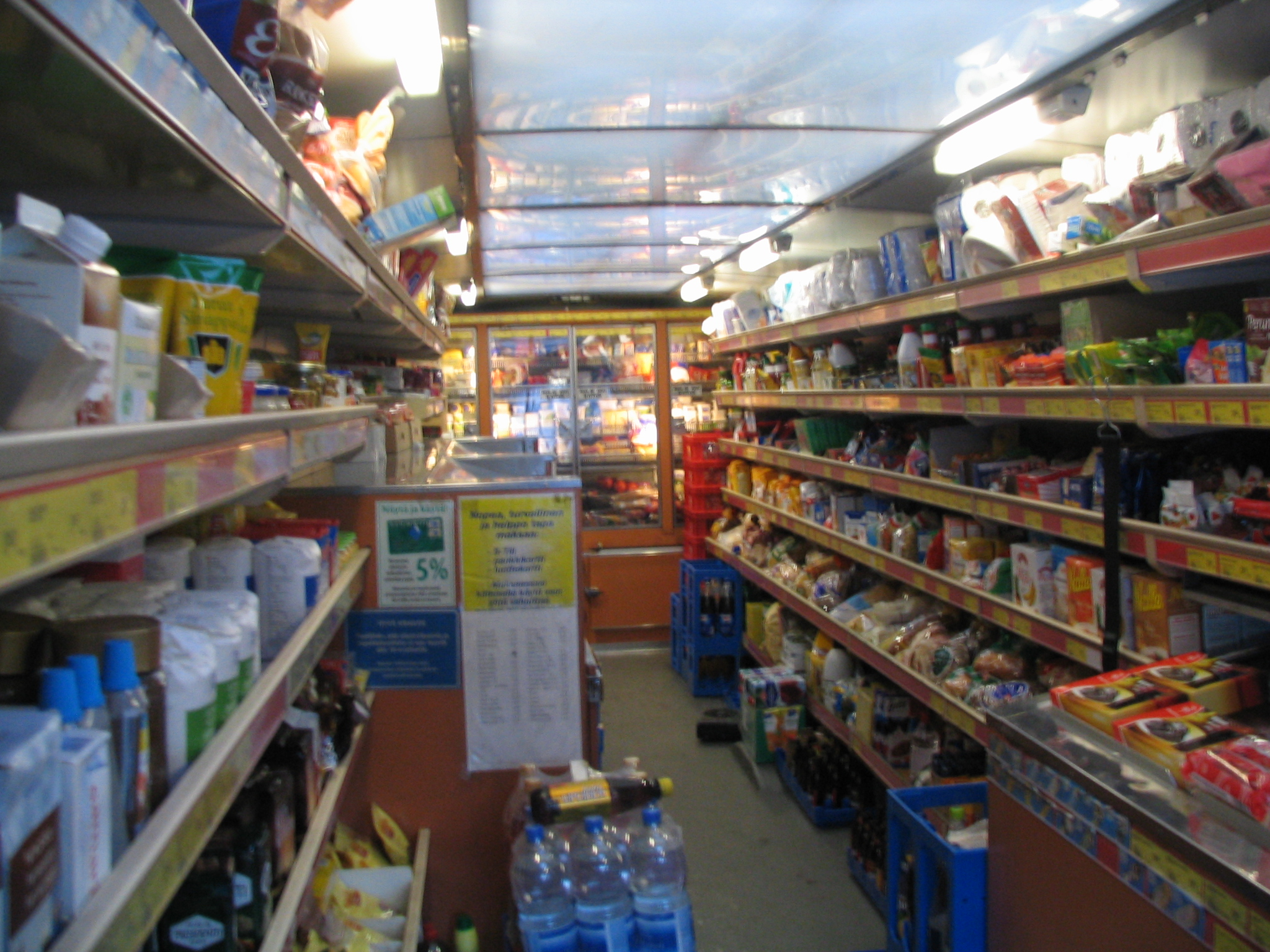 Finnish grocery store on wheels inside Suomalainen myymäläauto sisältä